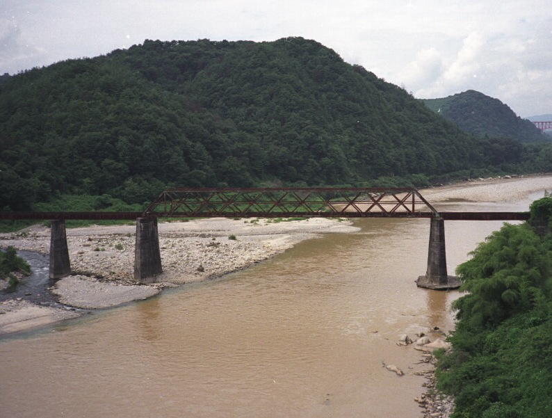 北恵那鉄道木曽川橋梁1